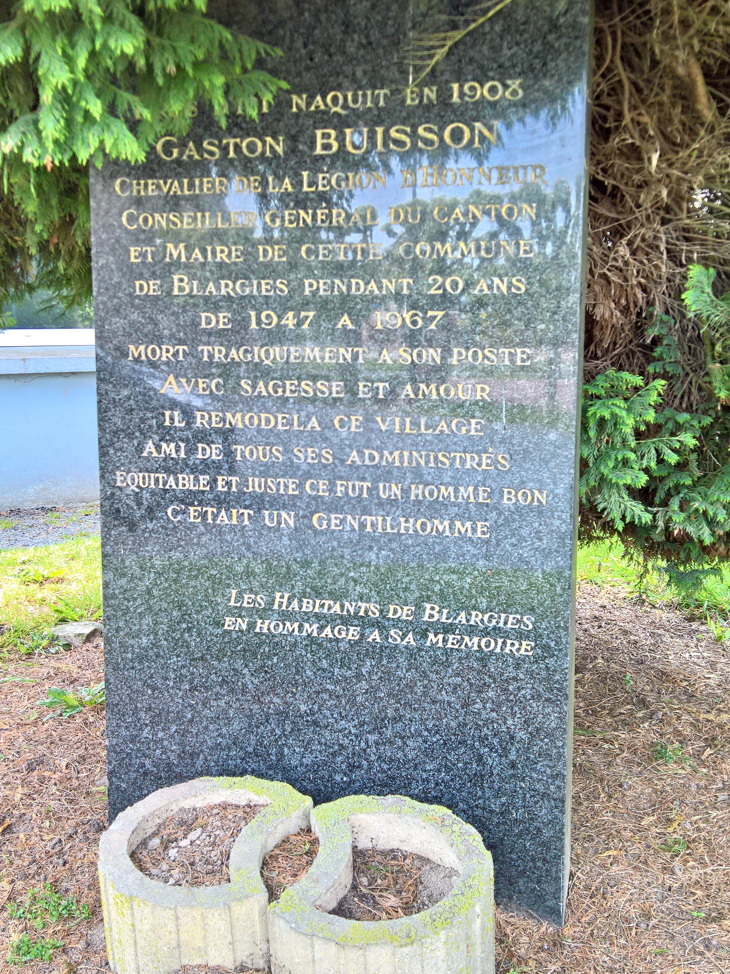 Blargies : Stèle commémorative de l'ancien maire et conseiller général Gaston Buisson